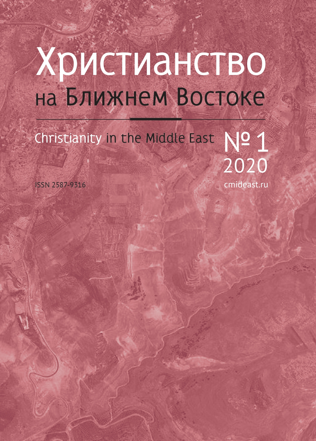 Обложка журнала "Христианство на Ближнем Востоке"